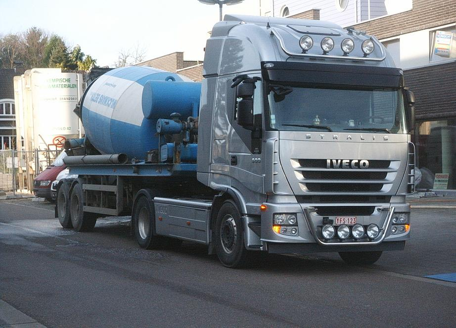 Iveco truck trekker betonmixer Zelf genomen foto in Tessenderlo